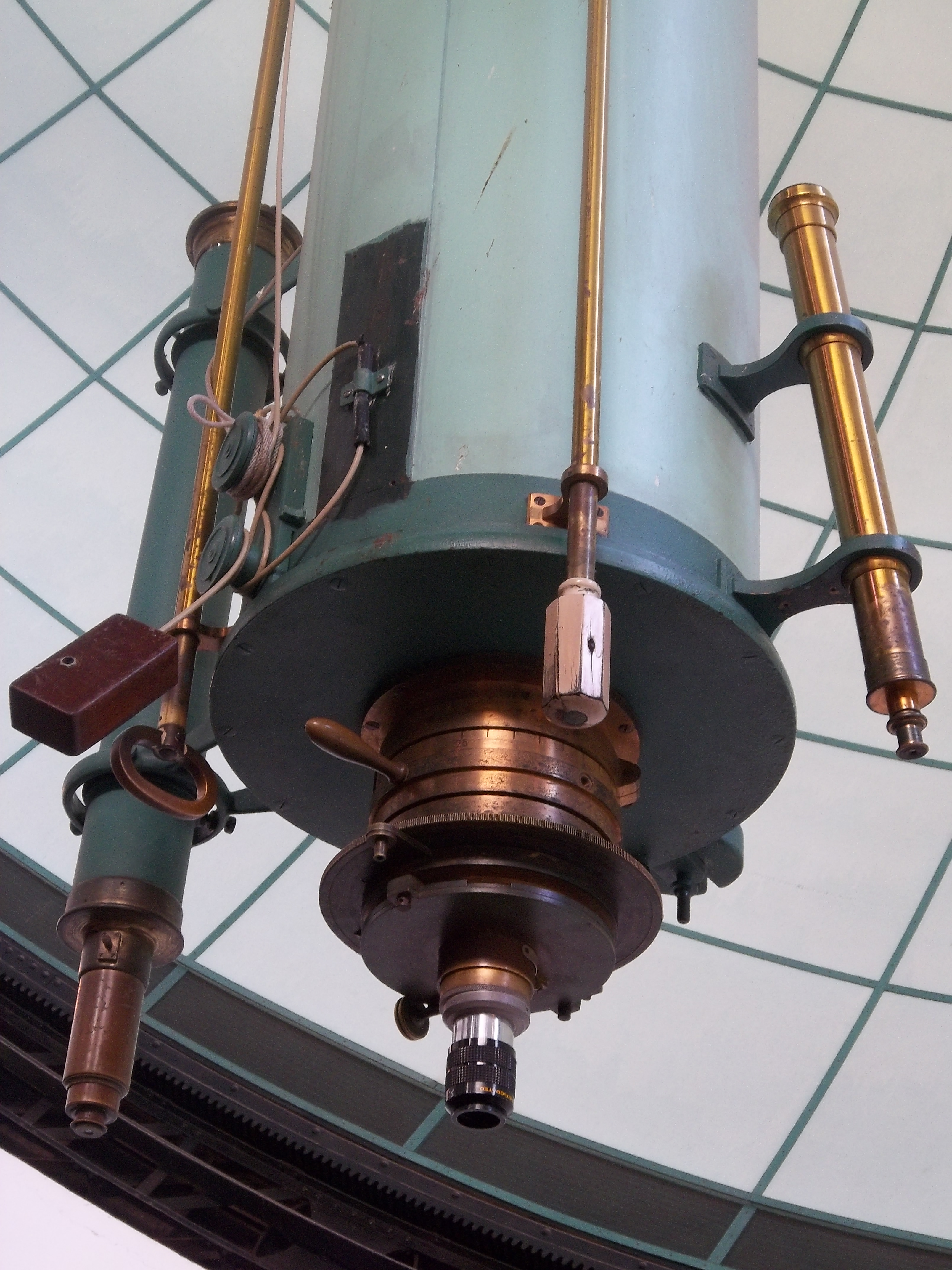 Detalle del ocular del telescopio refractor Gran Ecuatorial Gautier en el observatorio de La Plata, provincia de Buenos Aires, Argentina.